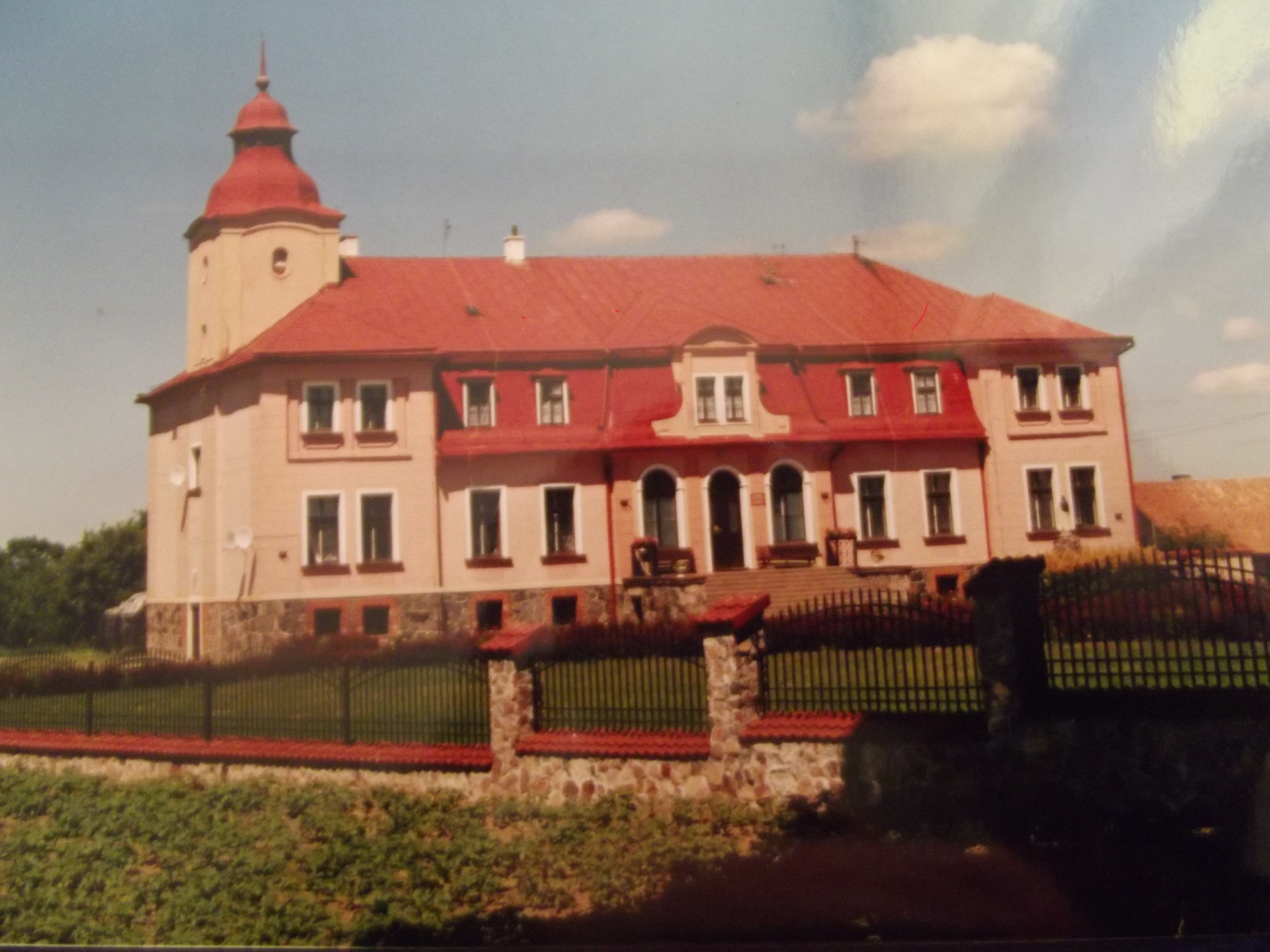 pałac /ob. klasztor/ widok od trasy E-7 elewacja frontowa Rychnowo, Grunwald